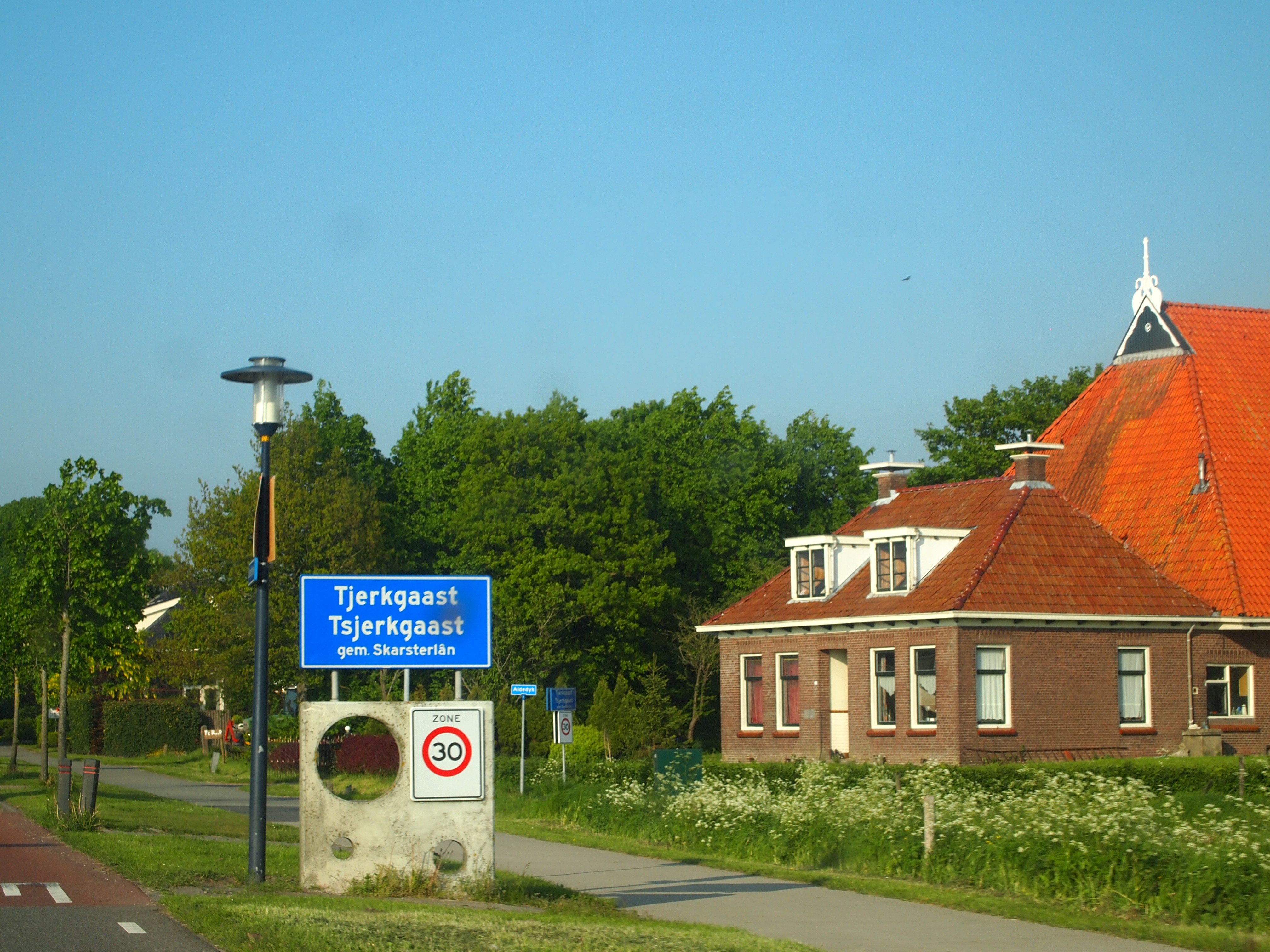 Plaatsnaam Tjerkgaast.